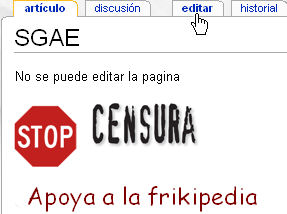 Censura de la SGAE en La Frikipedia.